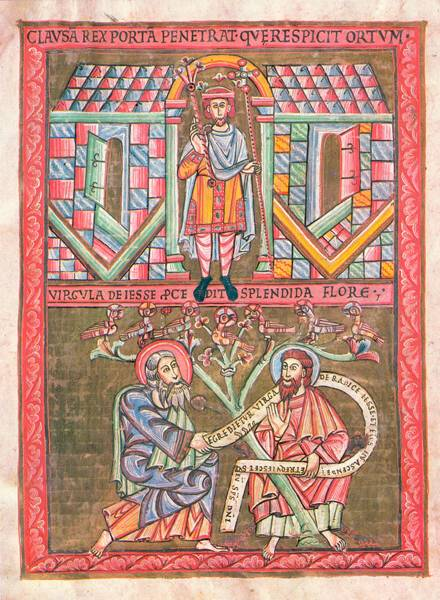 Tree of Jesse, Vyšehrad Codex, folio 4v; vyobrazení biblického panovníka v bráně, pravděpodobně Vratislava II.